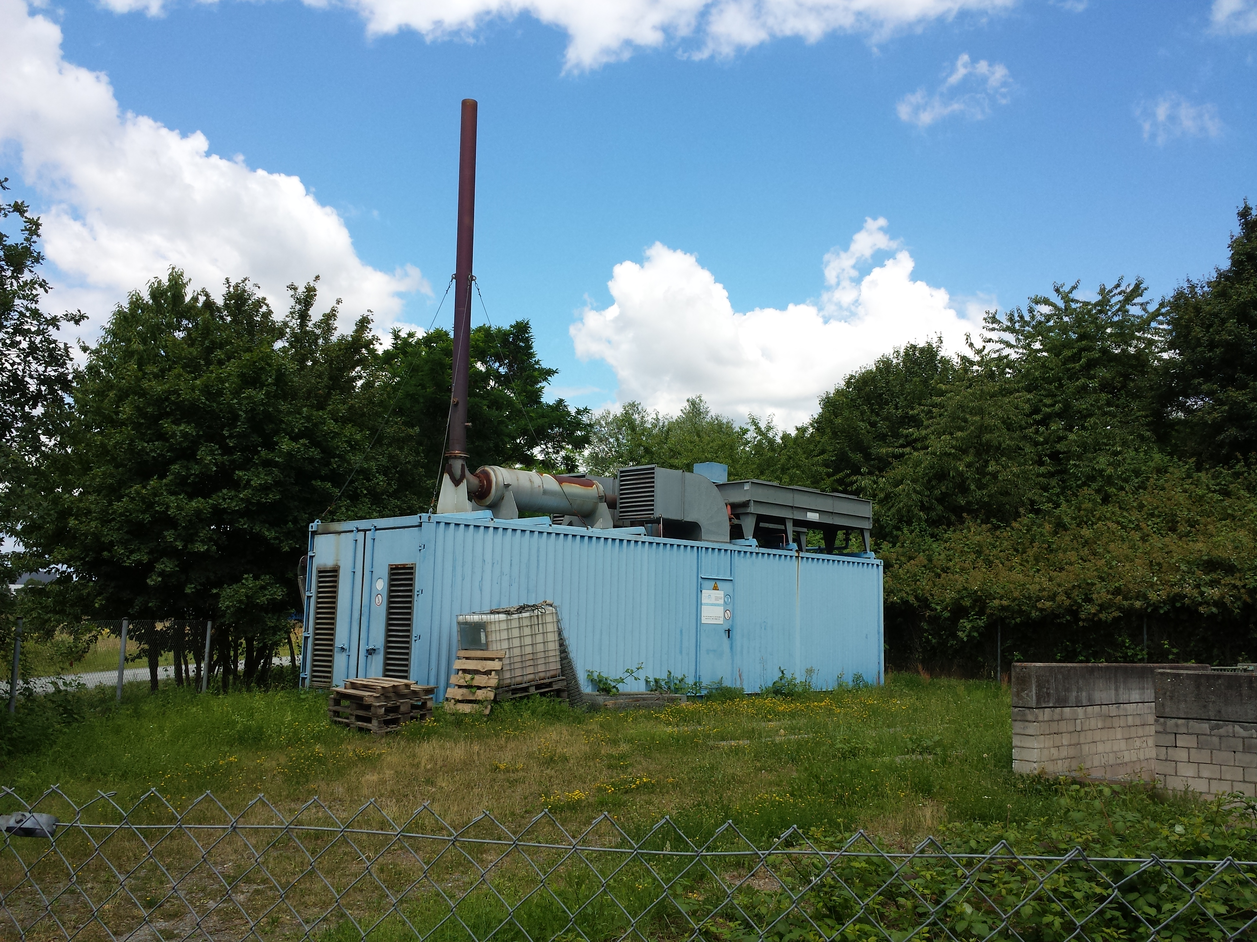 Deponiegas-Anlage am Oberwaldberg bei Mörfelden-Walldorf